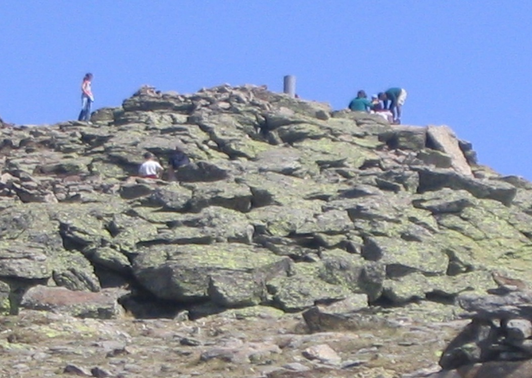 Cima del pico de Peñalara (Sierra de Guadarrama), España.